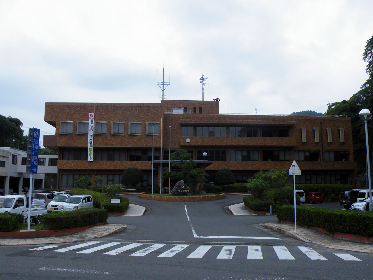 長崎県西海市役所本庁舎（旧西彼杵郡大瀬戸町役場庁舎）